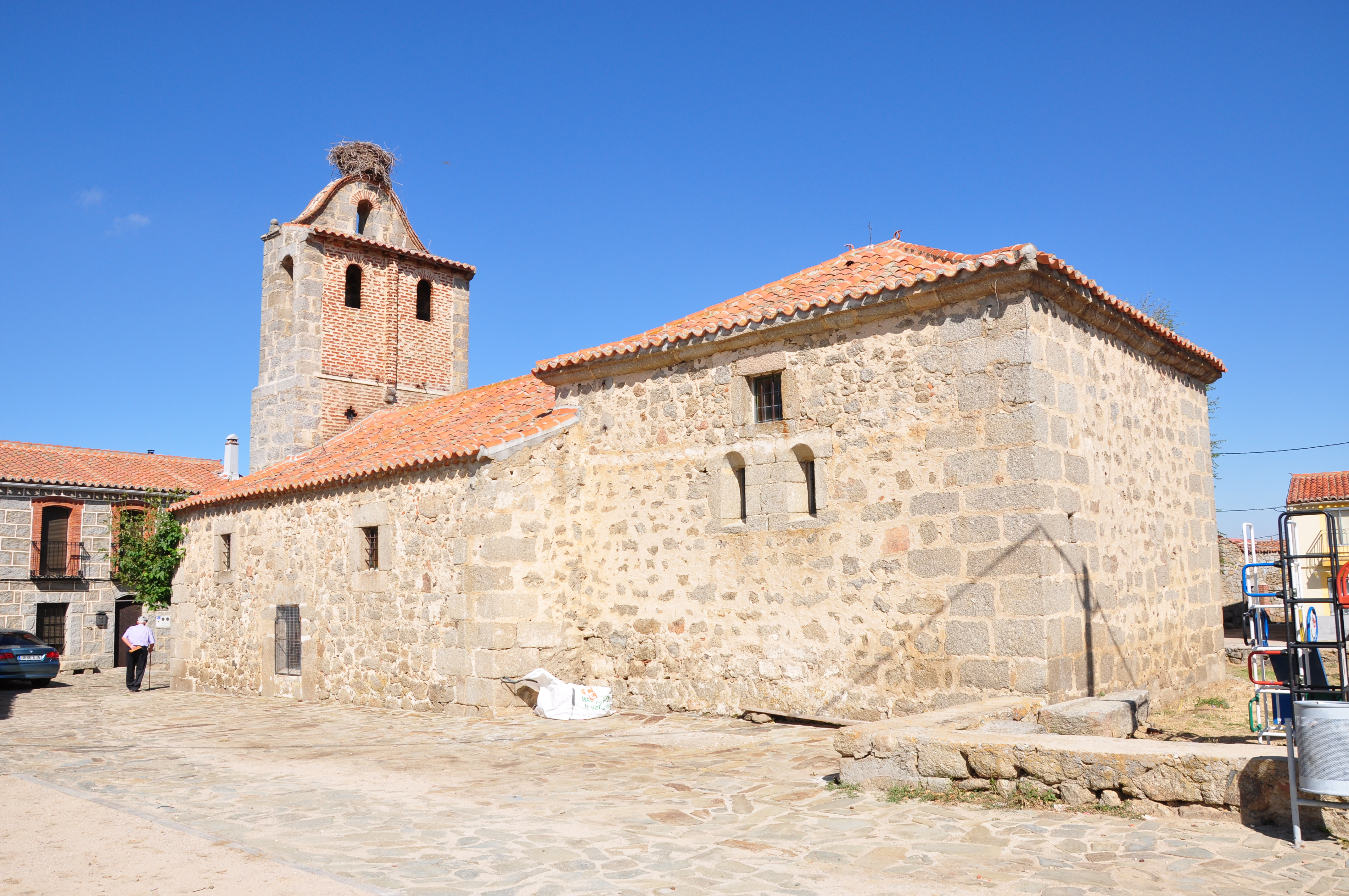 Iglesia de San Cristobal en Cillán (Ávila), España.